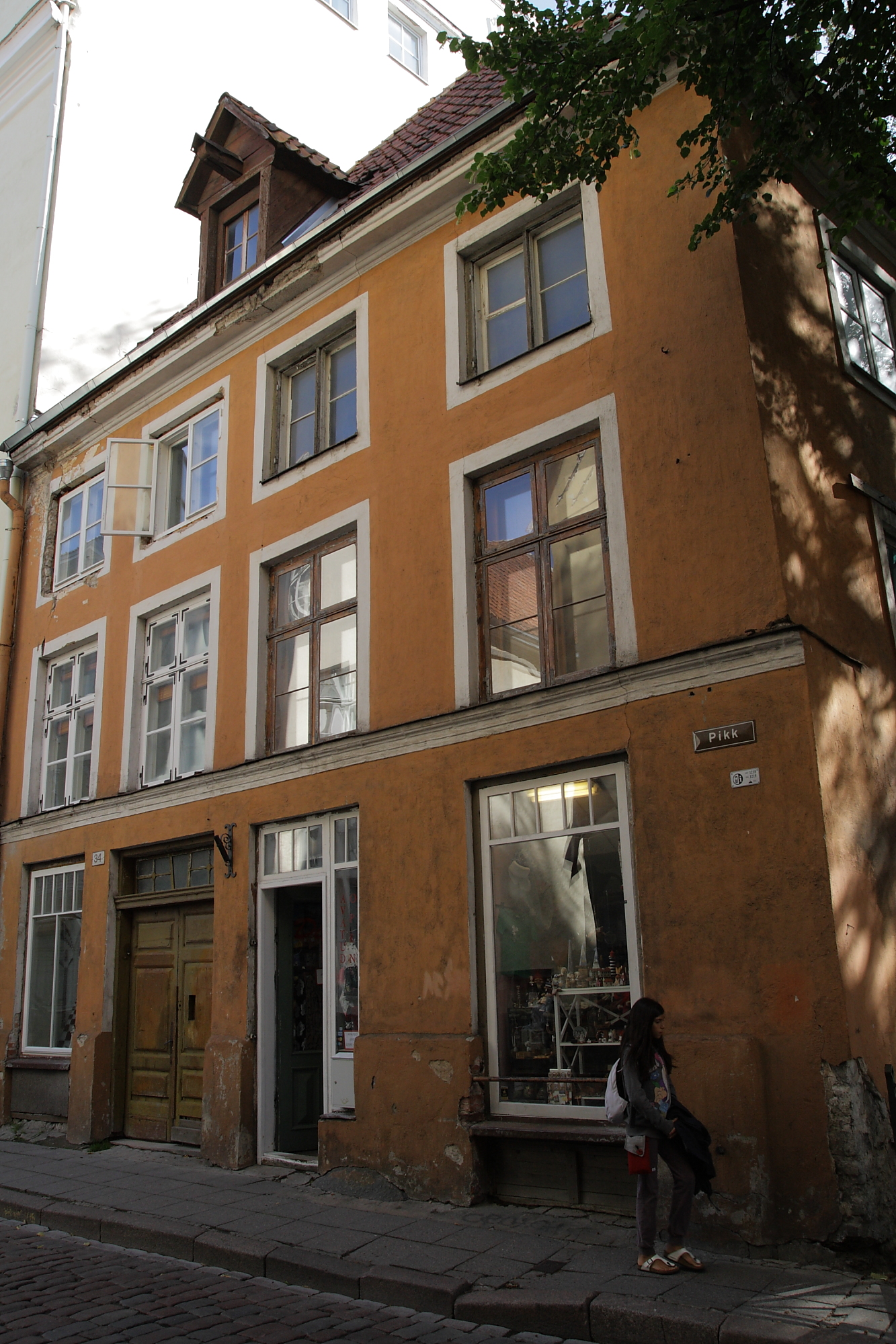 Tallinn, elamu Pikk 34, 15.-20.saj